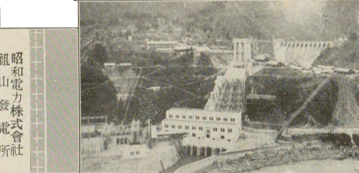 昭和電力株式会社の祖山発電所。1930年（昭和5年）12月10日運用開始。